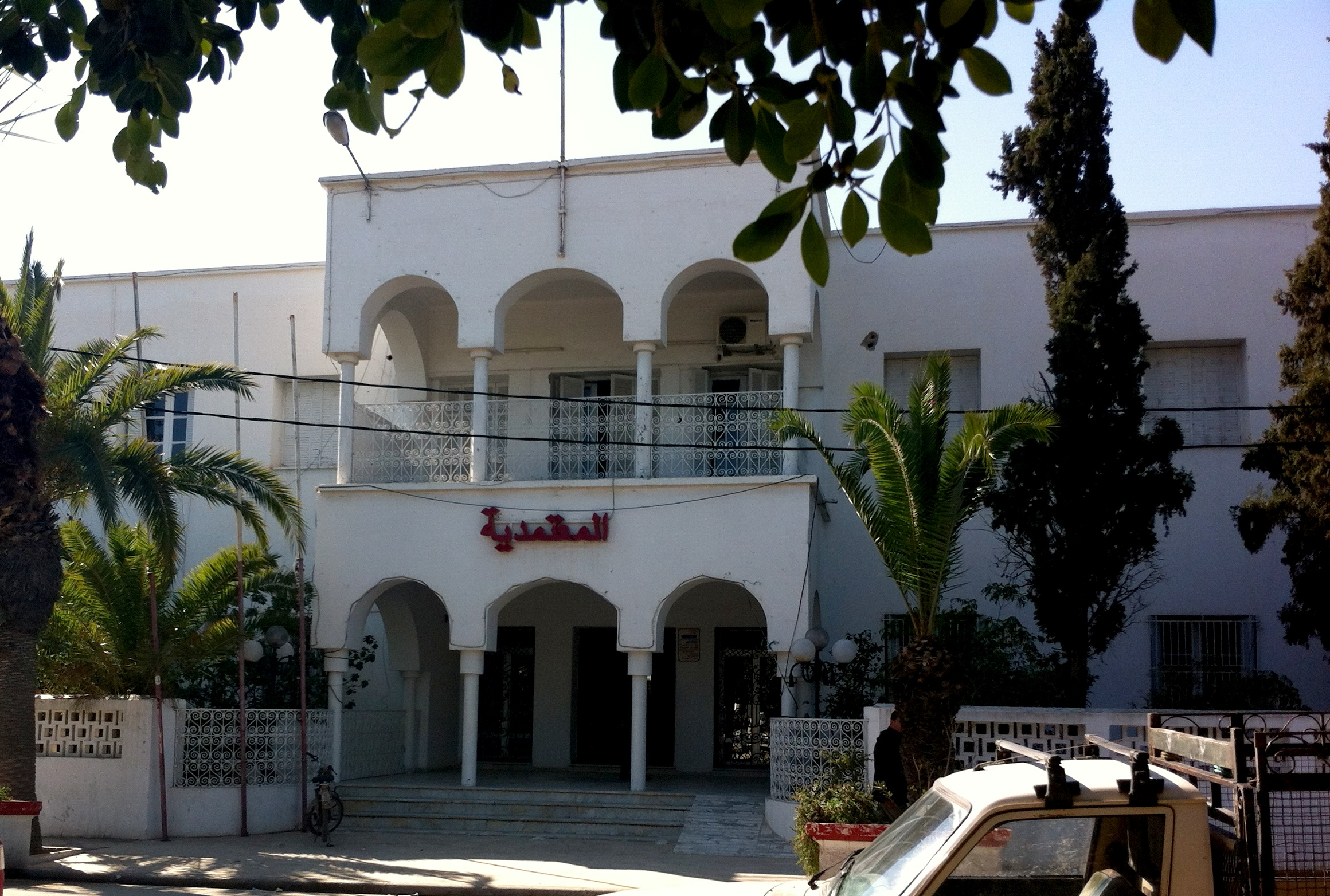 Siège de la délégation de la ville M'saken